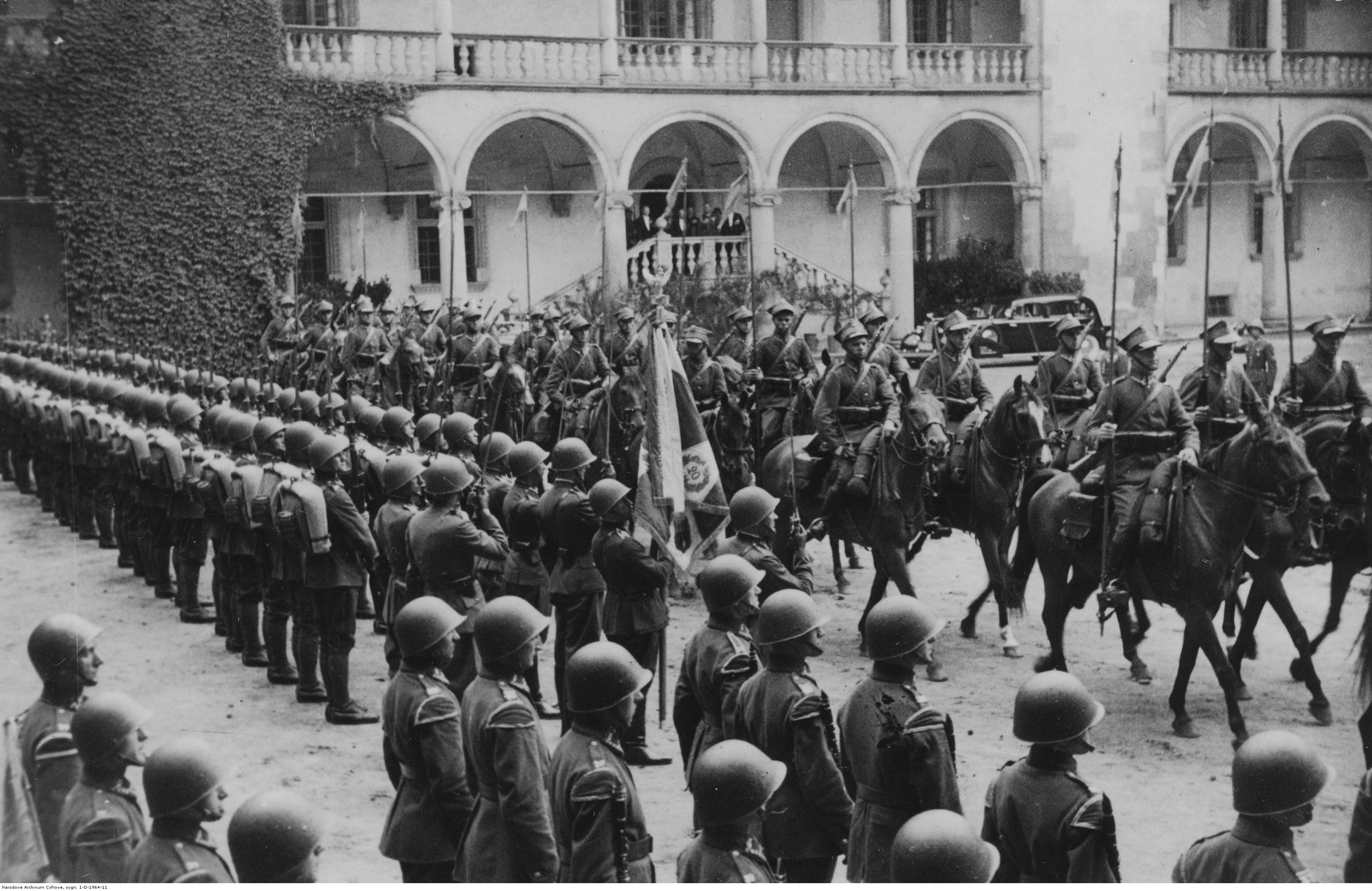 Wizyta ambasadora Włoch w Polsce Pietro Arone di Valentino w Krakowie połączona ze złożeniem listów uwierzytelniających prezydentowi RP Ignacemu Mościckiemu. Szwadron honorowy 8 Pułku Ułanów księcia Józefa Poniatowskiego eskortujący ambasadora Włoch w Polsce Pietro Arone di Valentino i kompania honorowa 20 Pułku Piechoty Ziemi Krakowskiej witająca ambasadora na dziedzińcu Wawelu; 20 lipca 1936. Koncern Ilustrowany Kurier Codzienny - Archiwum Ilustracji. Sygnatura: 1-D-1964-11